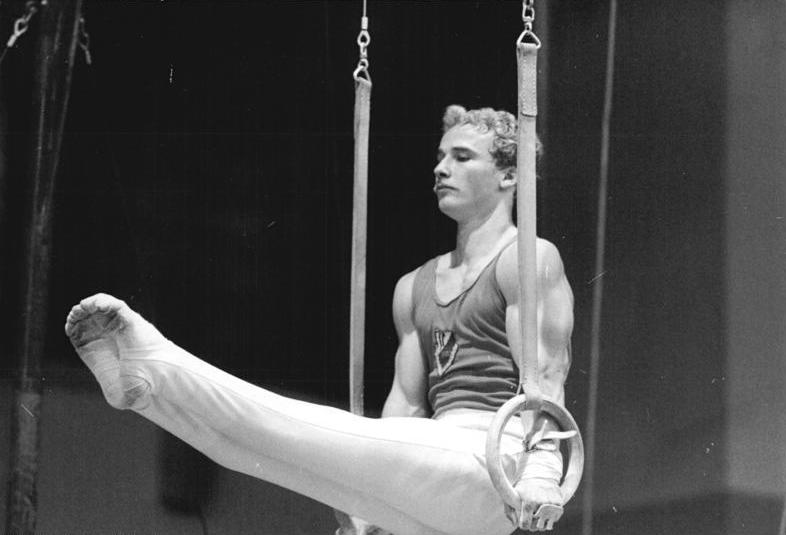 Jens Fischer ADN-ZB Schindler 20.8.83 Berlin: DDR-Turnmeisterschaften -Erfolgreichster Teilnehmer der viertägigen Wettkämpfe war der Mehrkampfsieger Jens Fischer (SC Cottbus). Der 20jährige holte sich den Titel an den Ringen, im Sprung und am Reck. Den ersten Rang am Barren teilte er sich mit seinem 18jährigen Klubkameraden Sylvio Kroll.